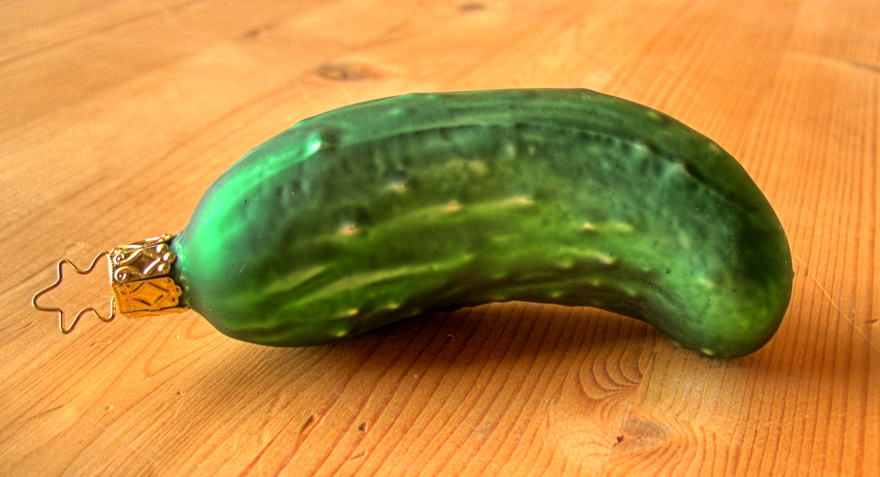 Christbaumschmuck in Form einer (Essig)Gurke der Firma INGE-Glas, Neustadt bei Coburg